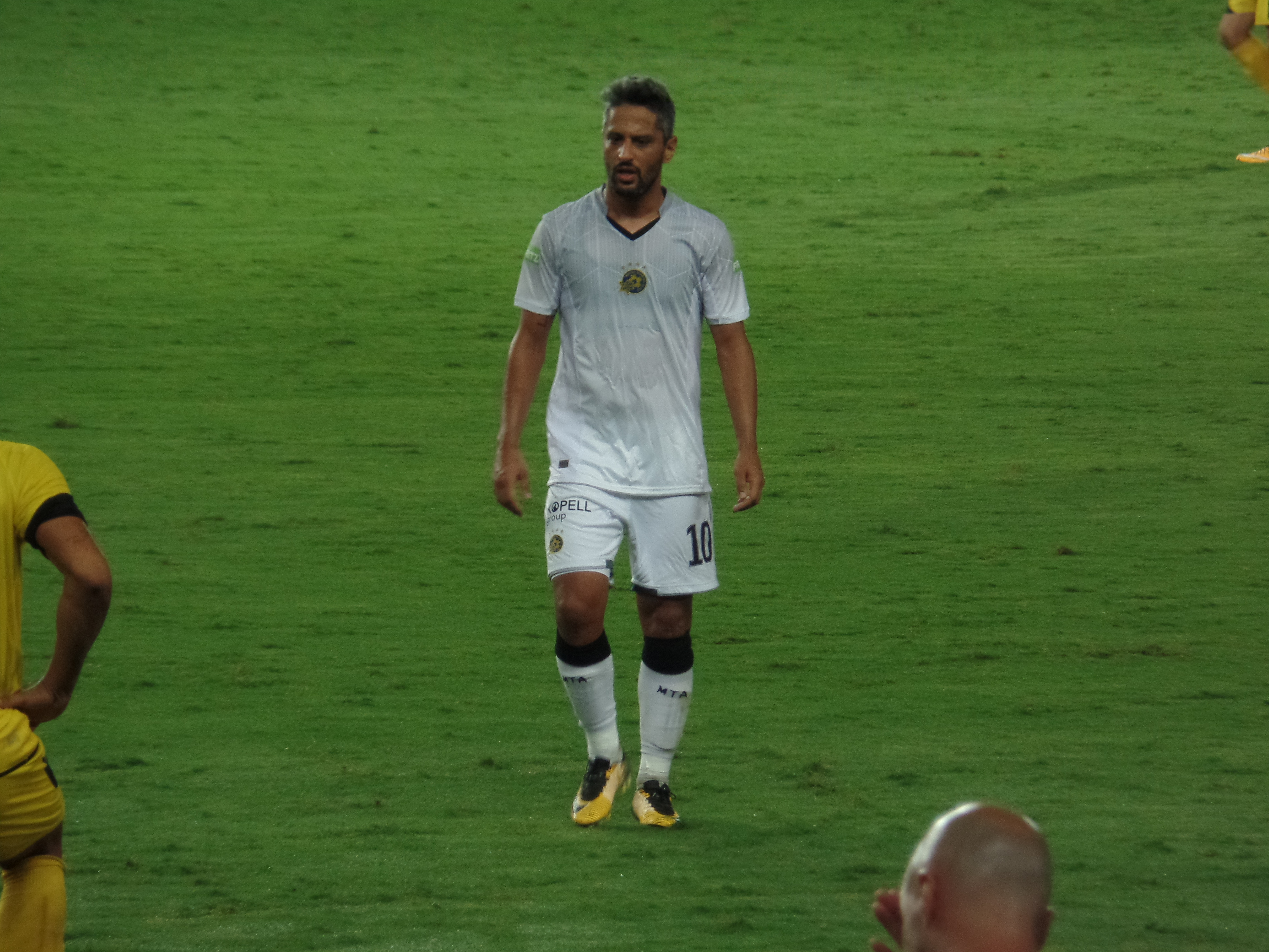 ברק יצחקי 2017